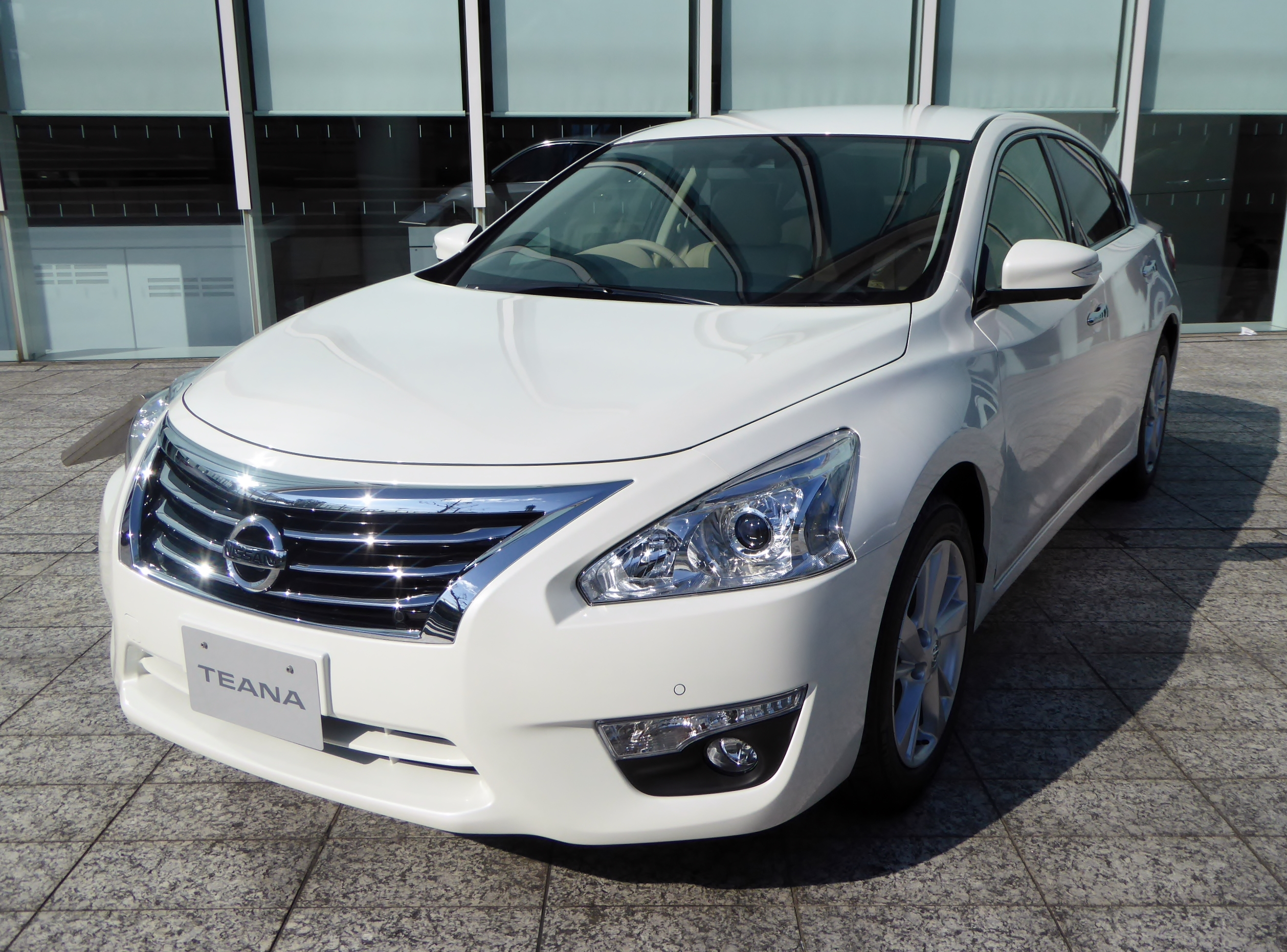 DBA-L33型日産・ティアナXVをフロントから撮影。